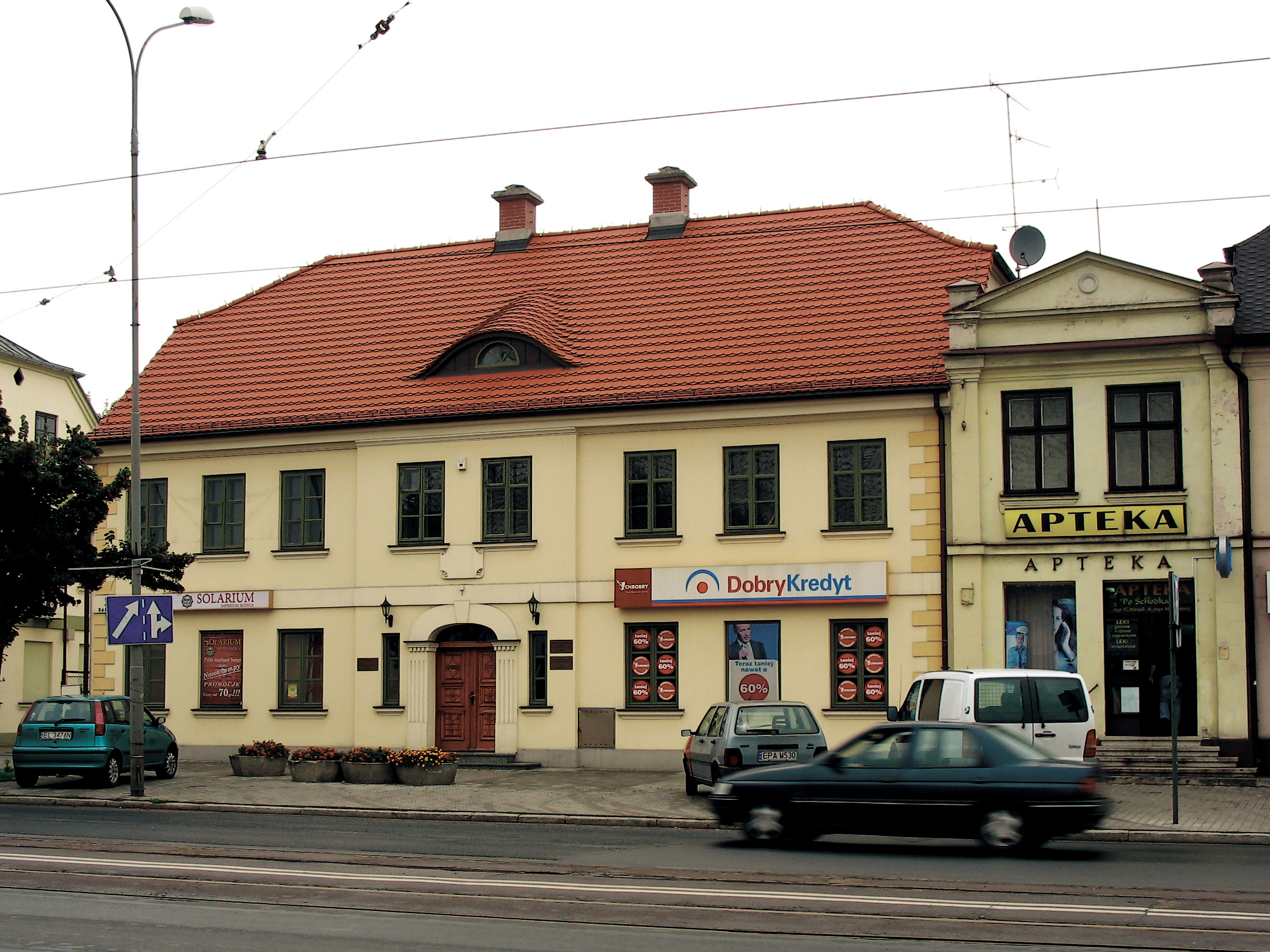 Pabianice, ul. Zamkowa - od lewej: ul. Zamkowa 21 - "Dom tkaczy" (zabytek nr A/637/185 z 29.08.1967 i 368-IV-30 z 12.10.1946) ul. Zamkowa 19 - "Apteka Po Schodkach"